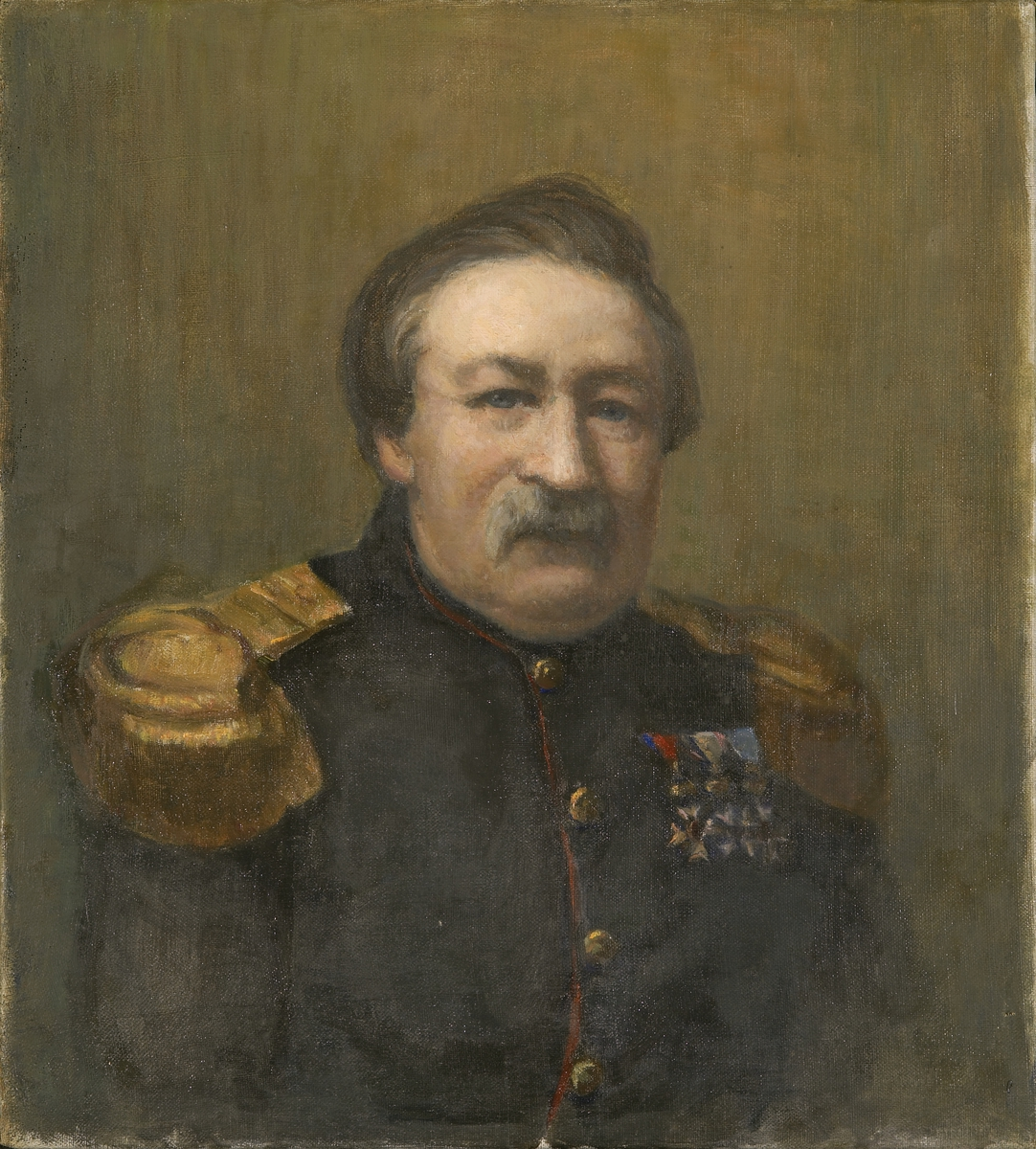 Portrett av Theodor Christian Anton Broch. Brystbilde. 1/4 høyre profil. Hår brunt, grå stenk. Mustasje grå-brun. Øyne blå. Ansiktsfarge rosa. Iført generalmajoruniform og med St. Olav, Sverdordenen og Danebrog på brystet. Bakgrunn grønn.